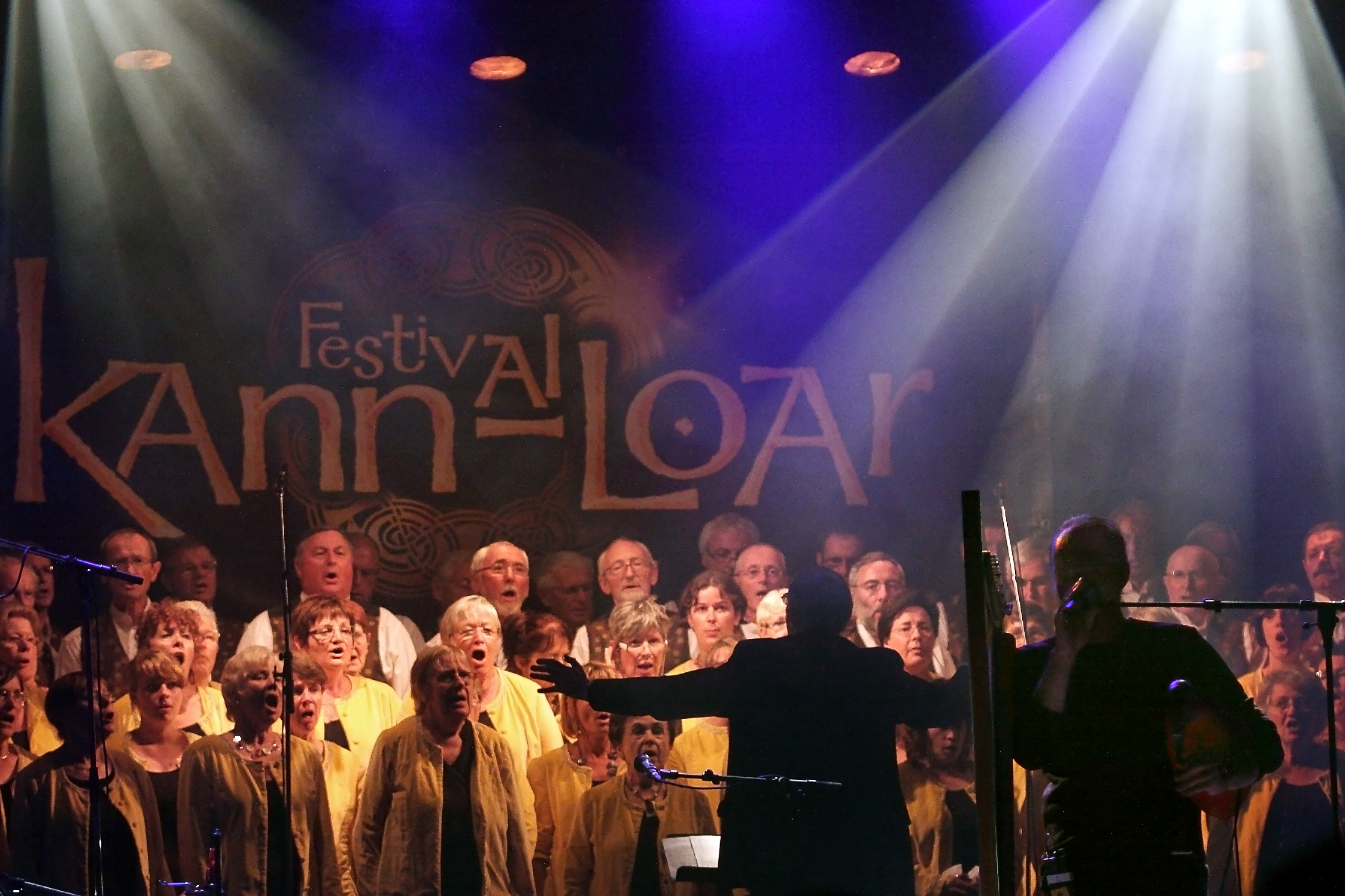 L'Ensemble Choral du Bout du Monde avec Alan Stivell en concert pour la tournée Emerald au festival Kann al Loar à l'espace St Ernel de Landerneau le 12 juillet 2010.